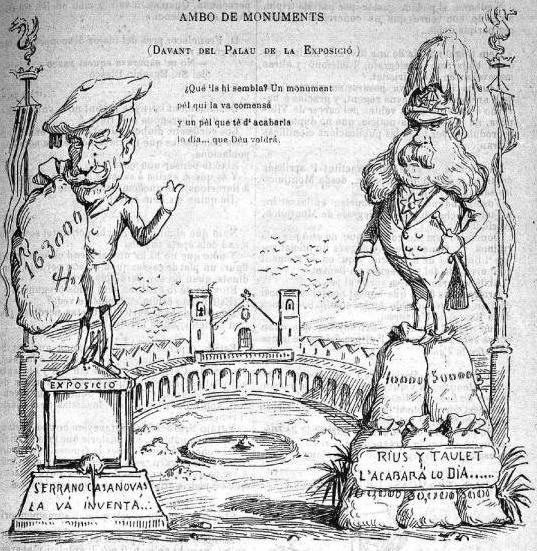 caricatura moliné